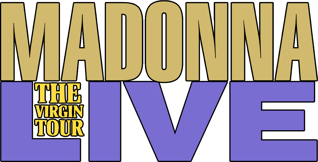 logo de "Live - The Virgin Tour", por Madonna.